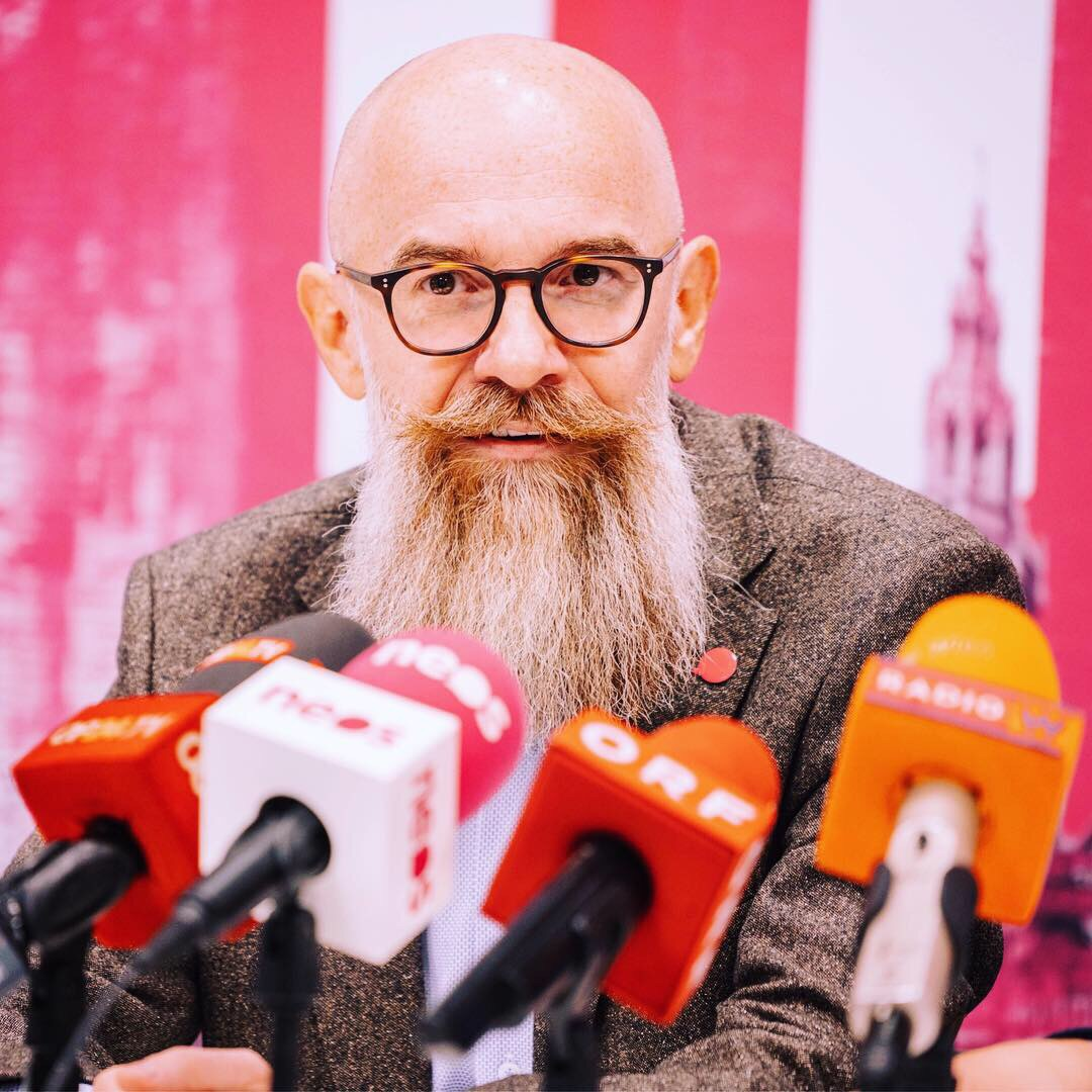 Thomas Weber bei seiner ersten Pressekonferenz als designierter Gemeinderat und Landtagsabgeordneter von Wien.